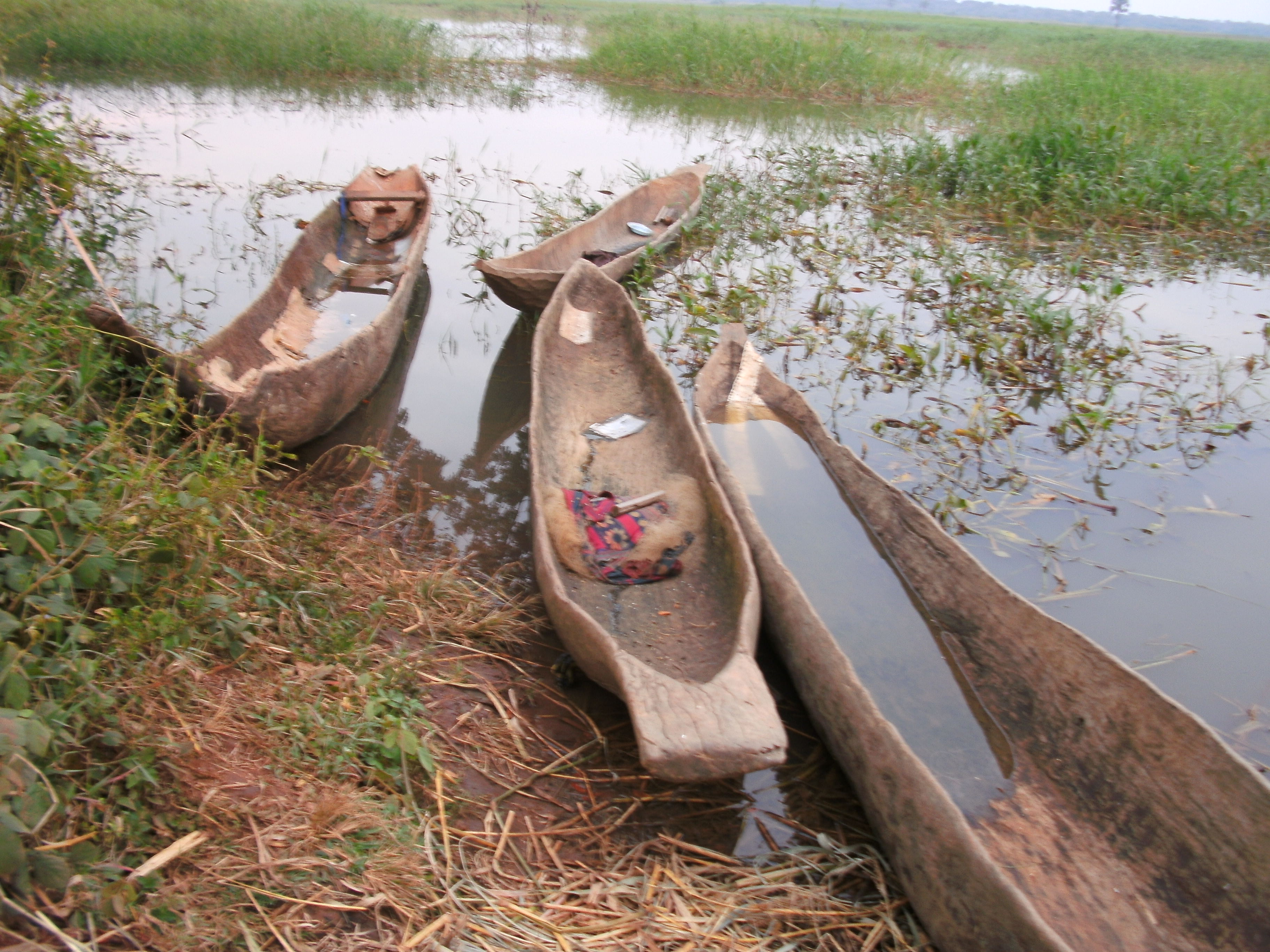 Cameroun - Akonolinga - Pirogues dans un tronc entier This is an image with the theme "Africa on the Move or Transport" from: Cameroon